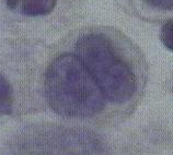 Mitosis